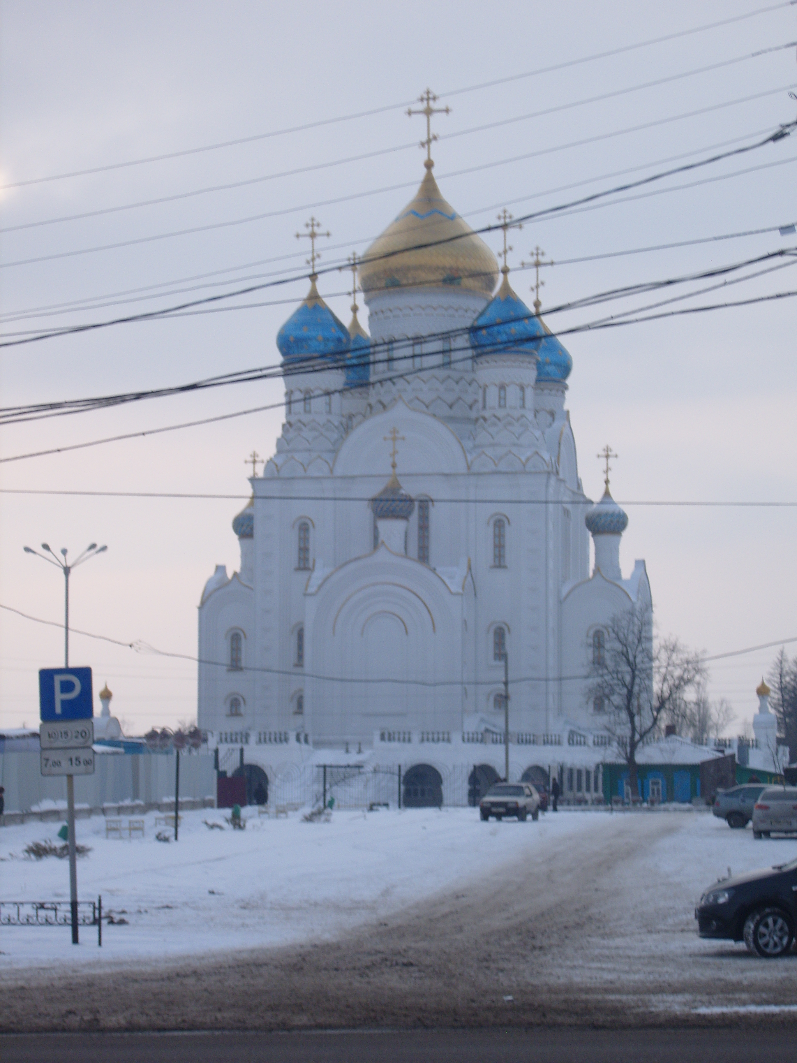 Церковь на Аллее Афганцев